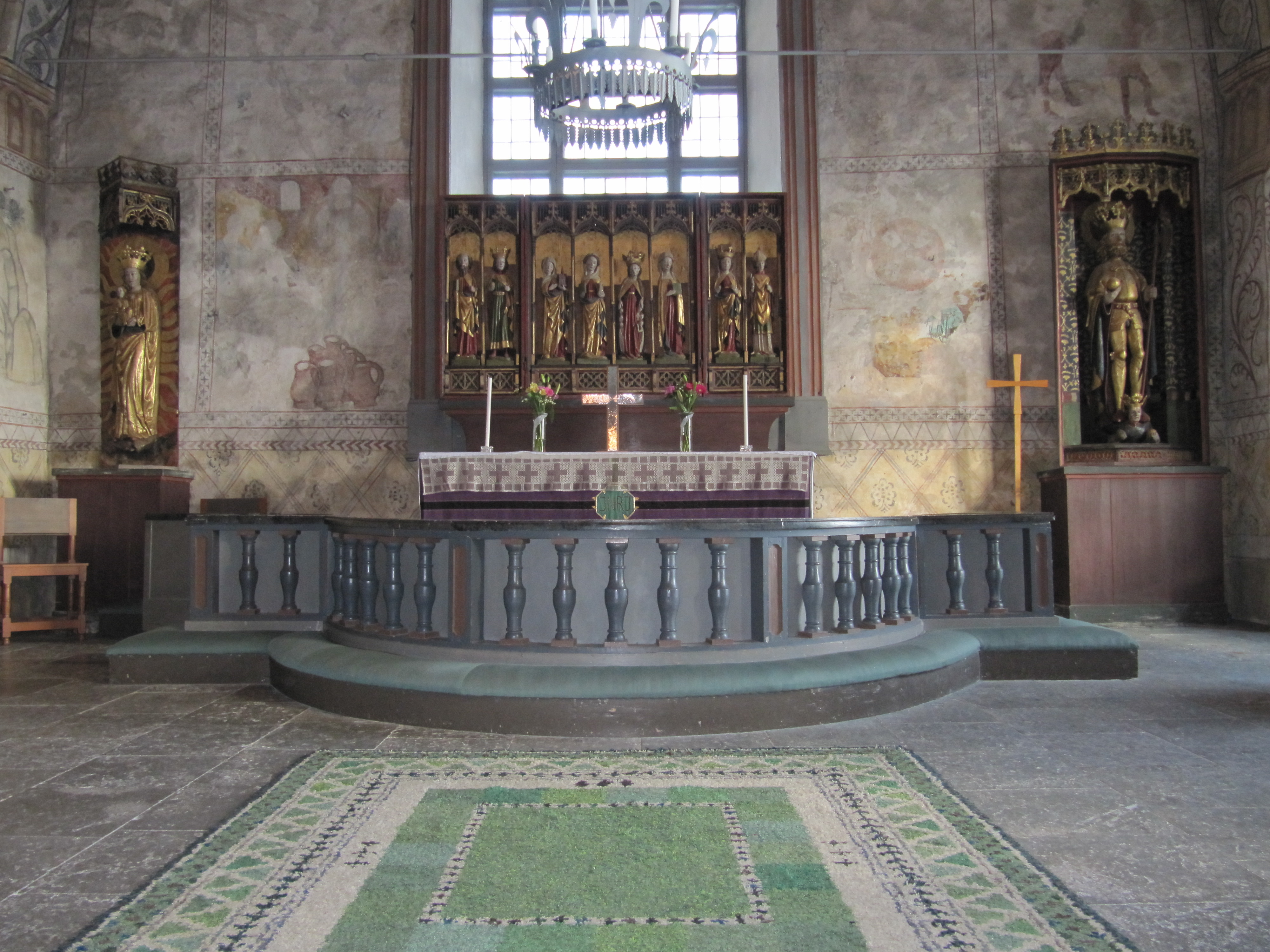 Kor och altaruppsats i Jumkils kyrka